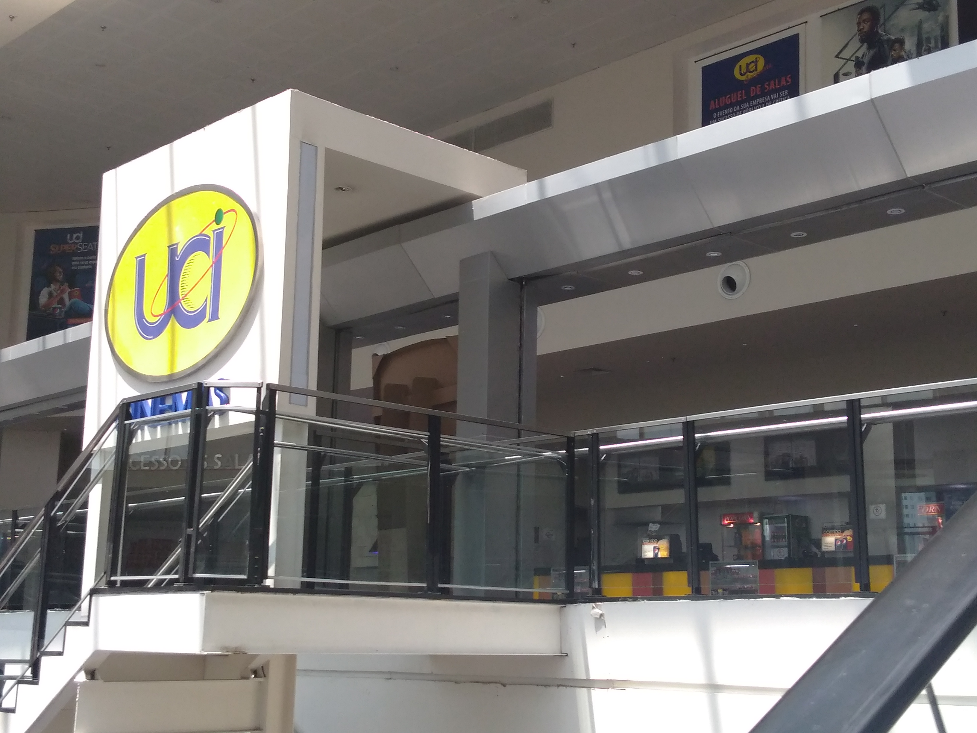 Fachada do UCI Santana Parque Shopping de São Paulo, SP